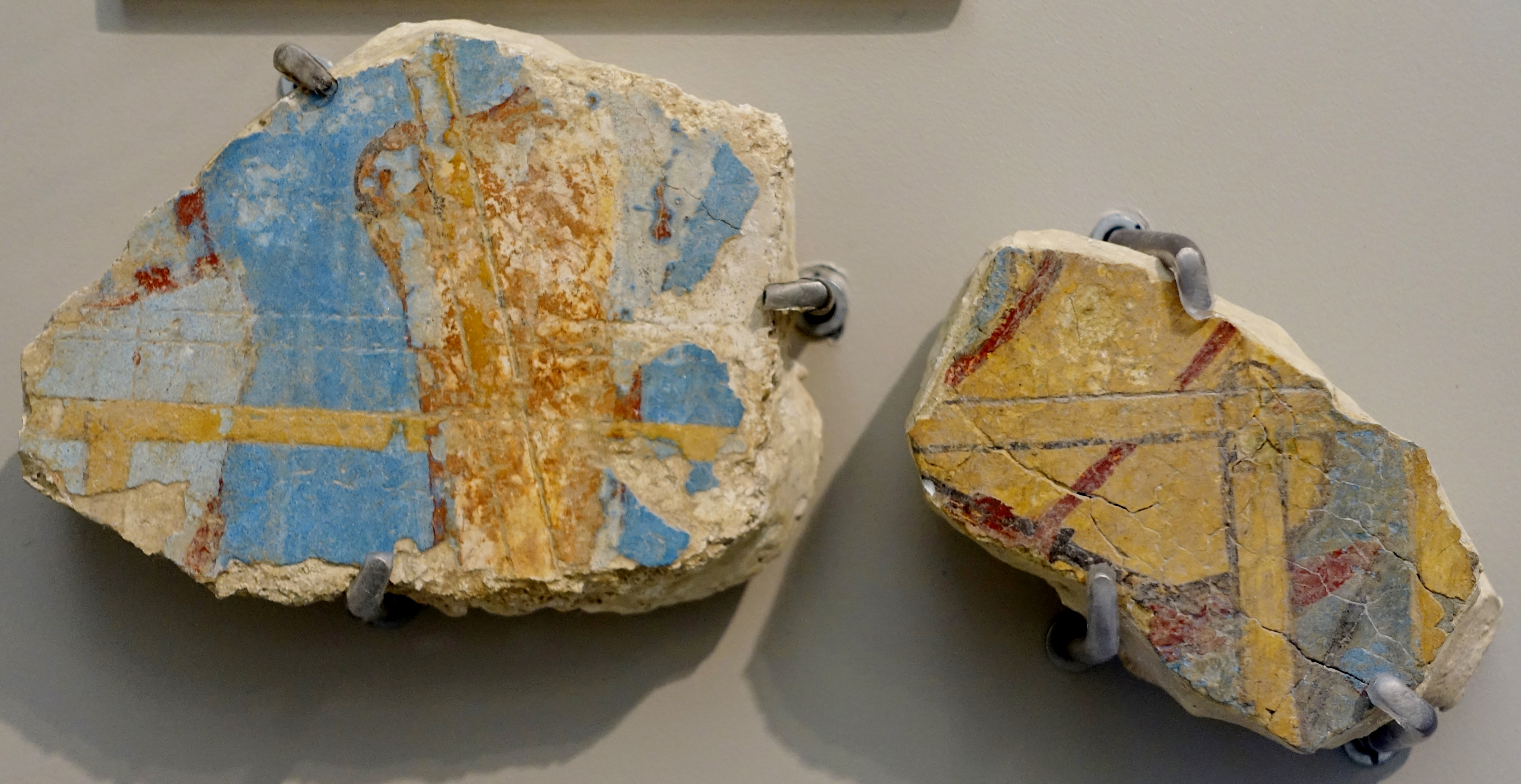 Fragmente des sogenannten Sänftenfreskos des Palastes von Knossos (1450–1350/1300 v. Chr.), ausgestellt im Archäologischen Museum Iraklio, Kreta, Griechenland